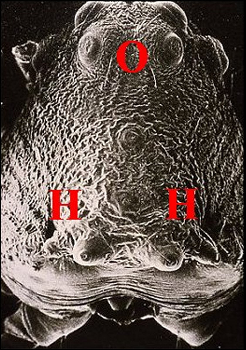 Vue dorsale de la carapace d'un mâle de Mastophora cornigera montrant les deux protubérances postérieures. M.E.B.